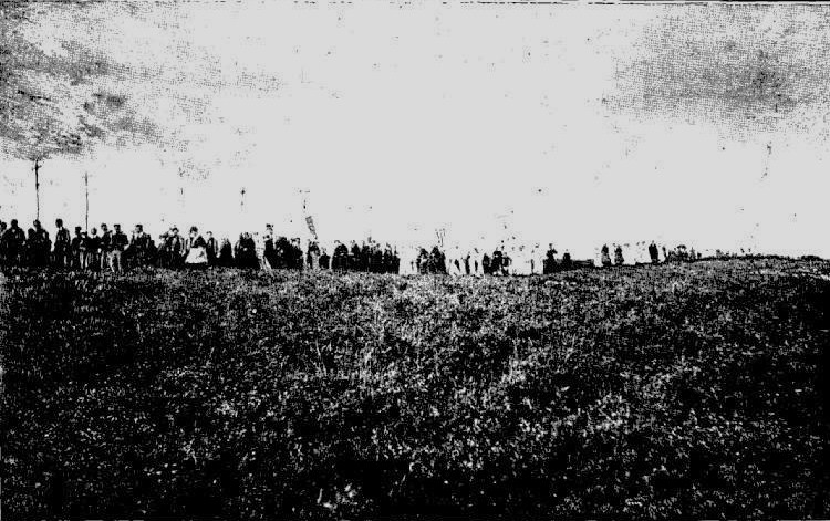 La Grande Troménie à Locronan dans le département français du Finistère en 1903 (procession qui a lieu tous les sept ans).